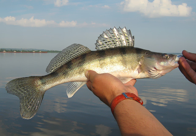 Берш (Sander volgensis)